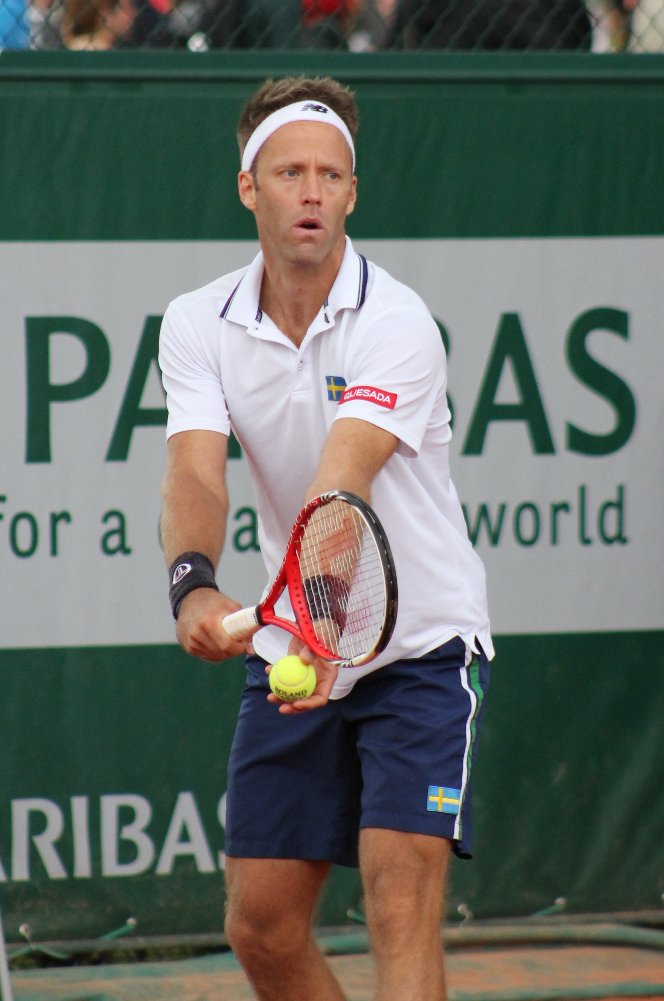 Lindstedt RG13 (4)